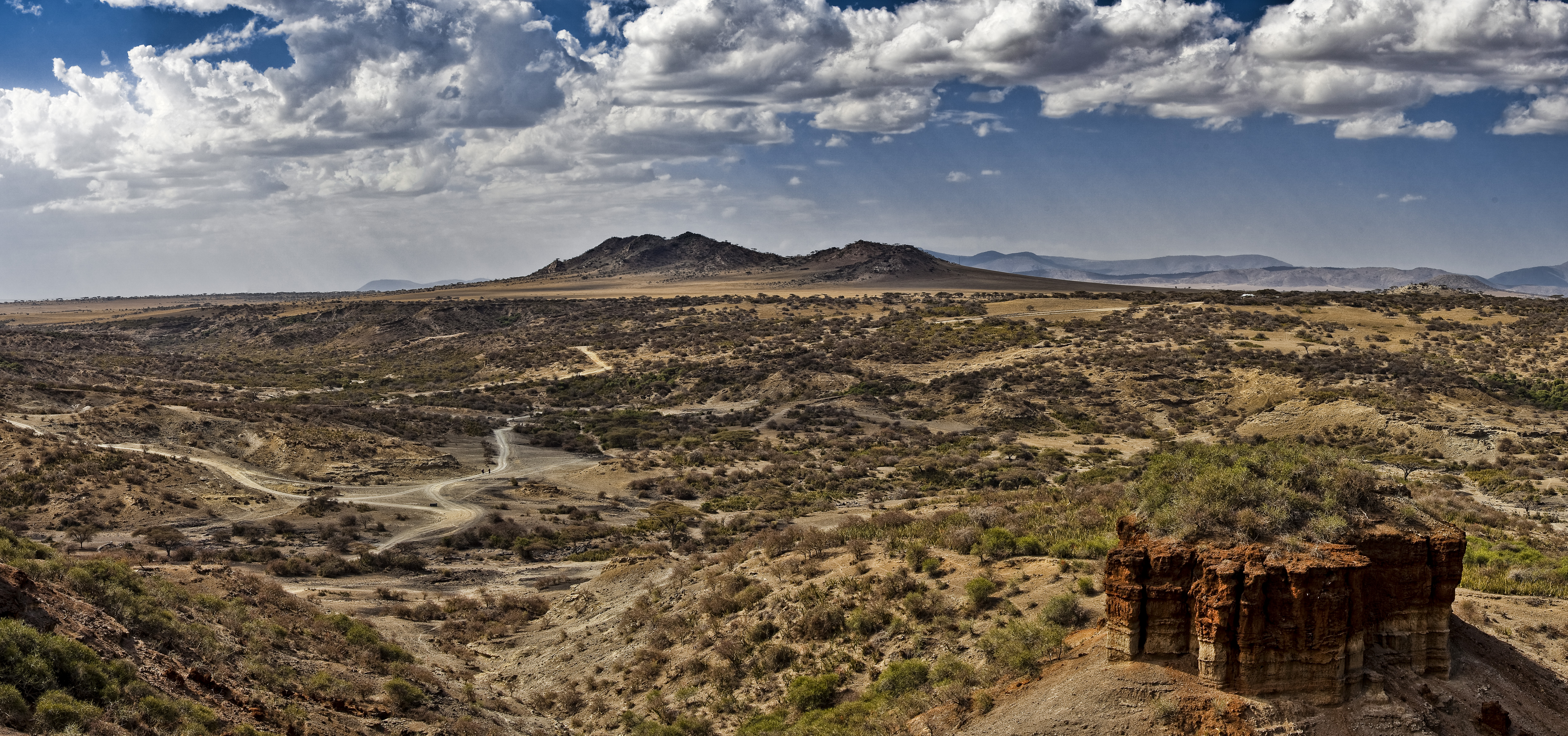 Olduvai Gorge or Oldupai Gorge